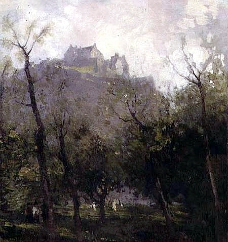 Edinburgh